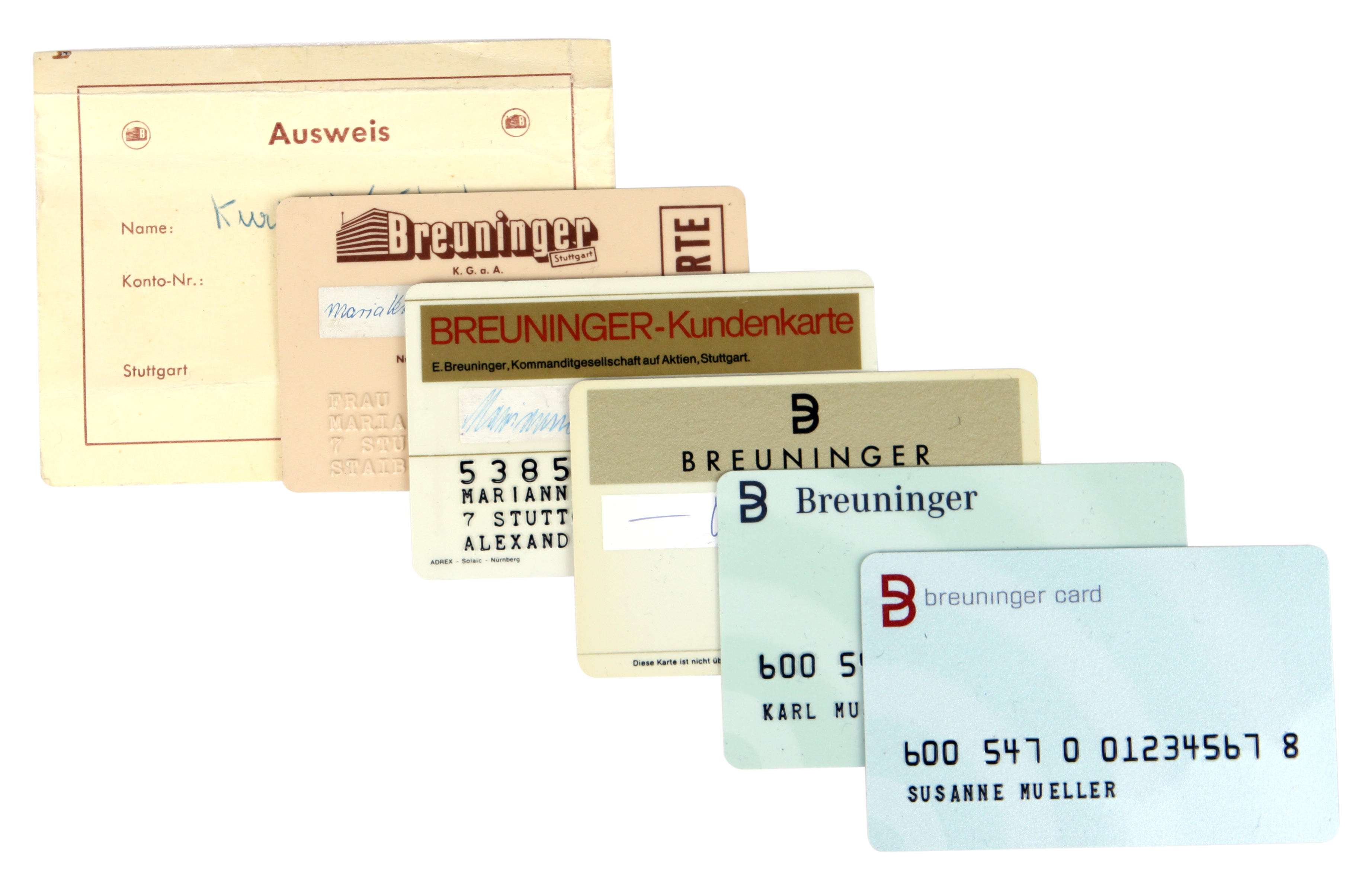 Breuninger Cards